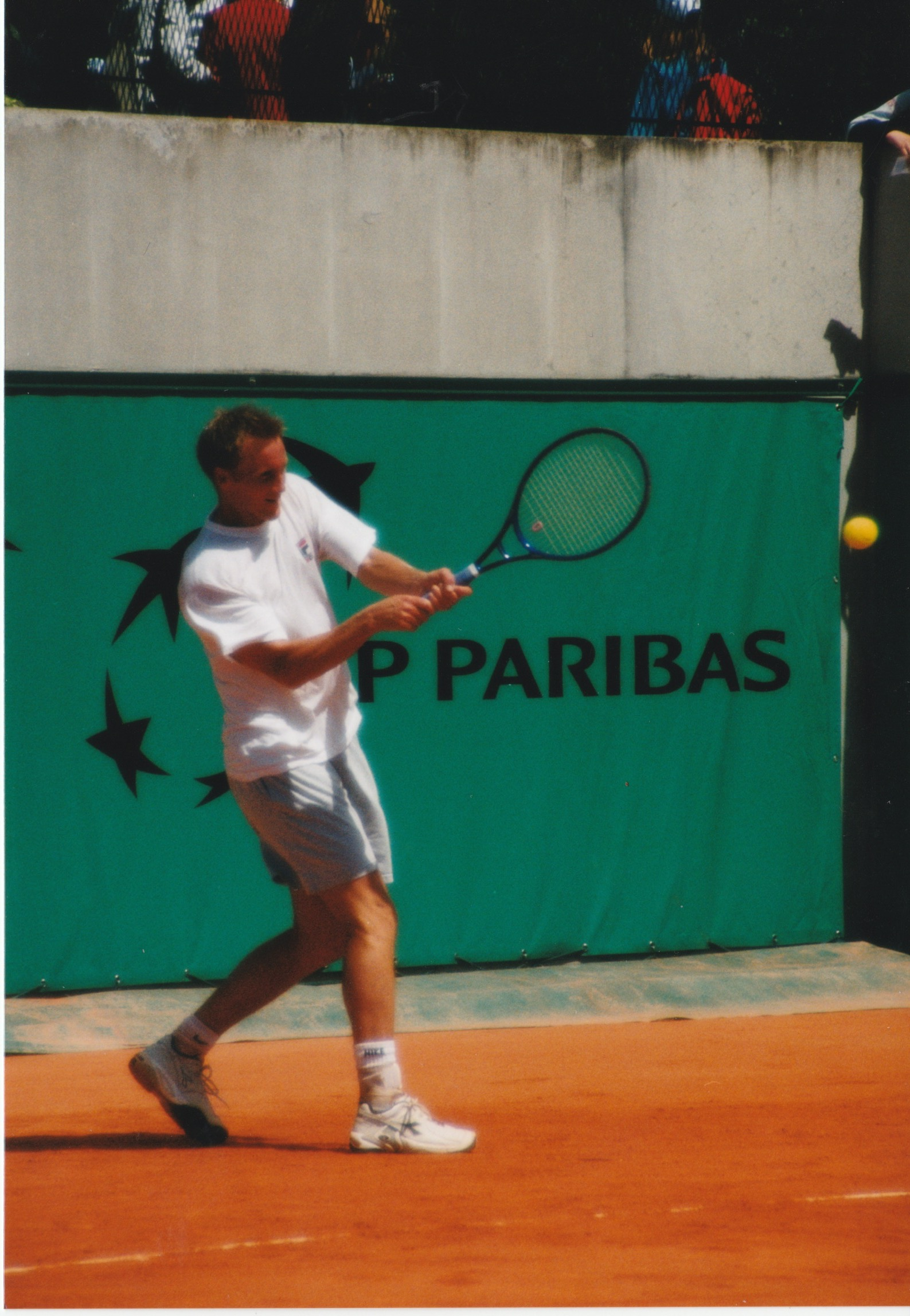 Christian Ruud slår en backhand i French Open 2000.